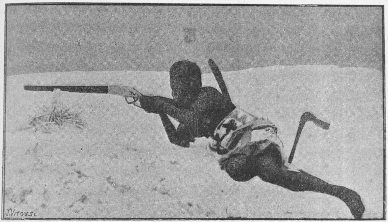 Amazone en embuscade